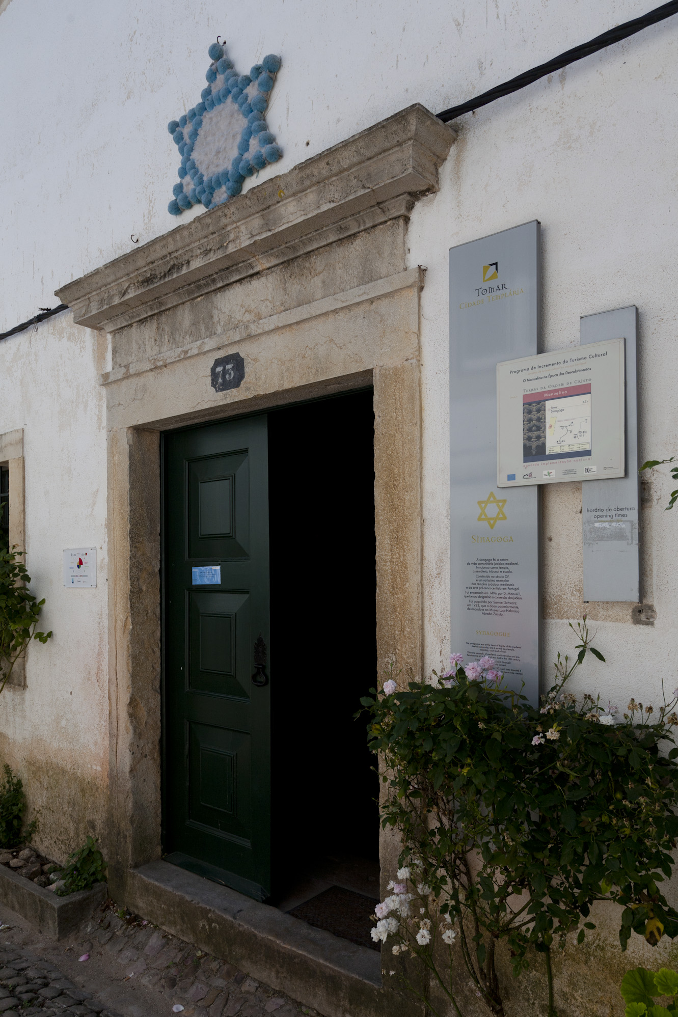 Sinagoga de Tomar